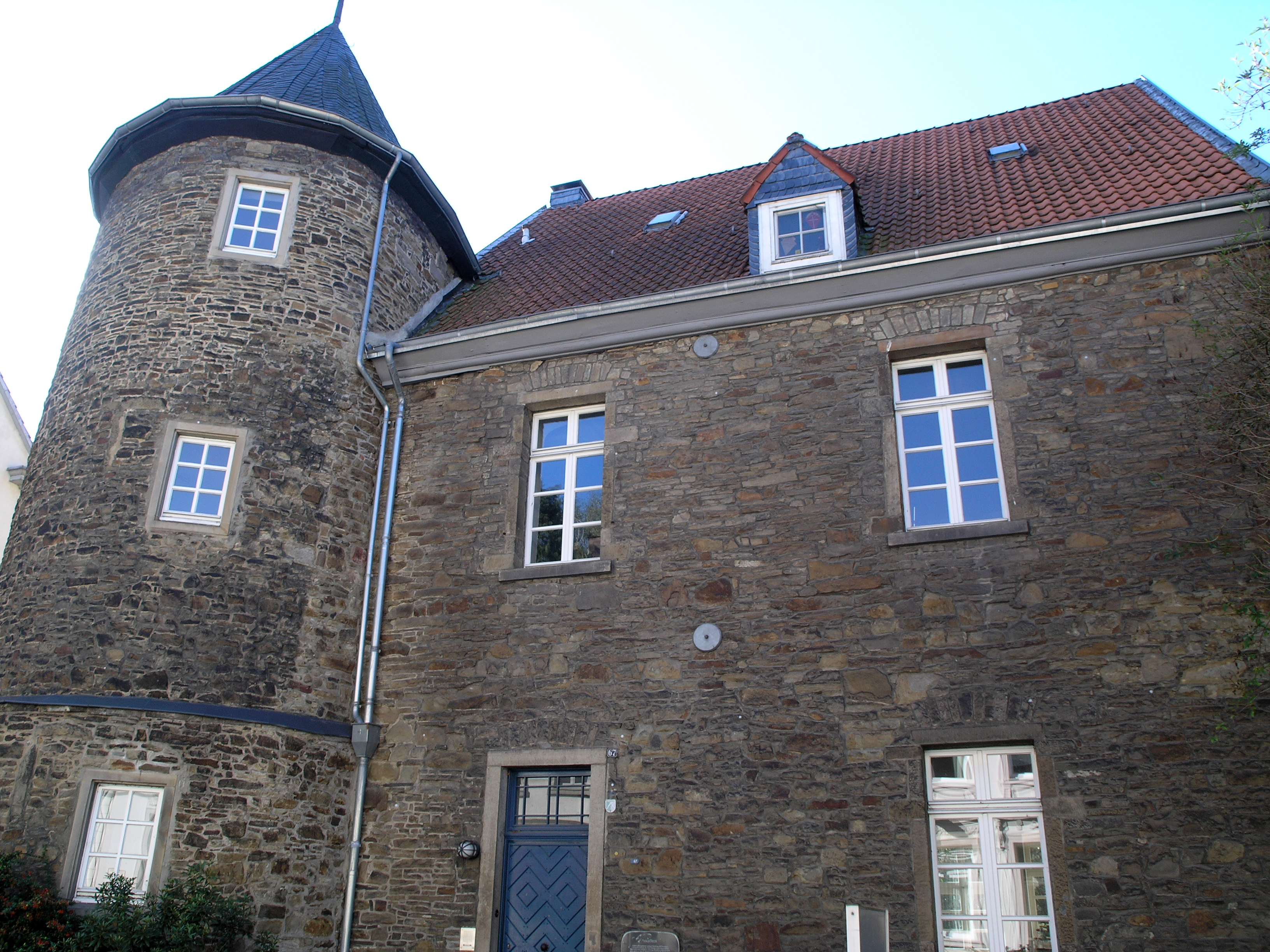 Северный Рейн-Вестфалия, Эссен, Верден - Дом Хек